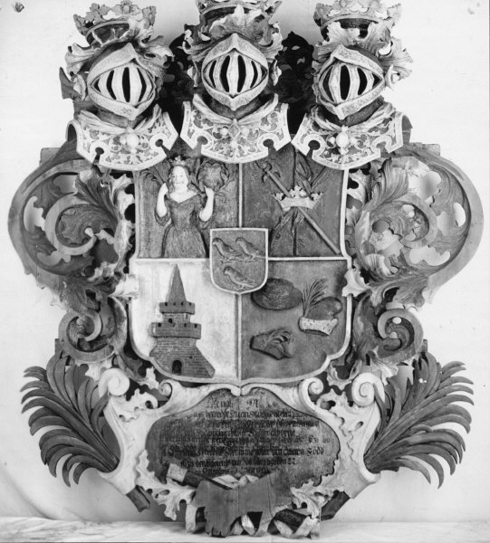 Begravningsvapen över Jöran Sperling, död 1691. Efter konservering. Kategori: (09) Vapen Begravningsvapen över Jöran Sperling, död 1691. Efter konservering.